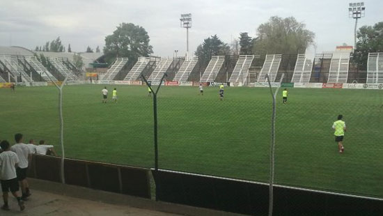 El Club Cipolletti es un club deportivo de Argentina. Fue fundado el 26 de octubre de 1926 en la ciudad de Cipolletti, provincia de Río Negro. Su principal actividad es el fútbol. Actualmente participa del Torneo Argentino A, tercera categoría del fútbol argentino.